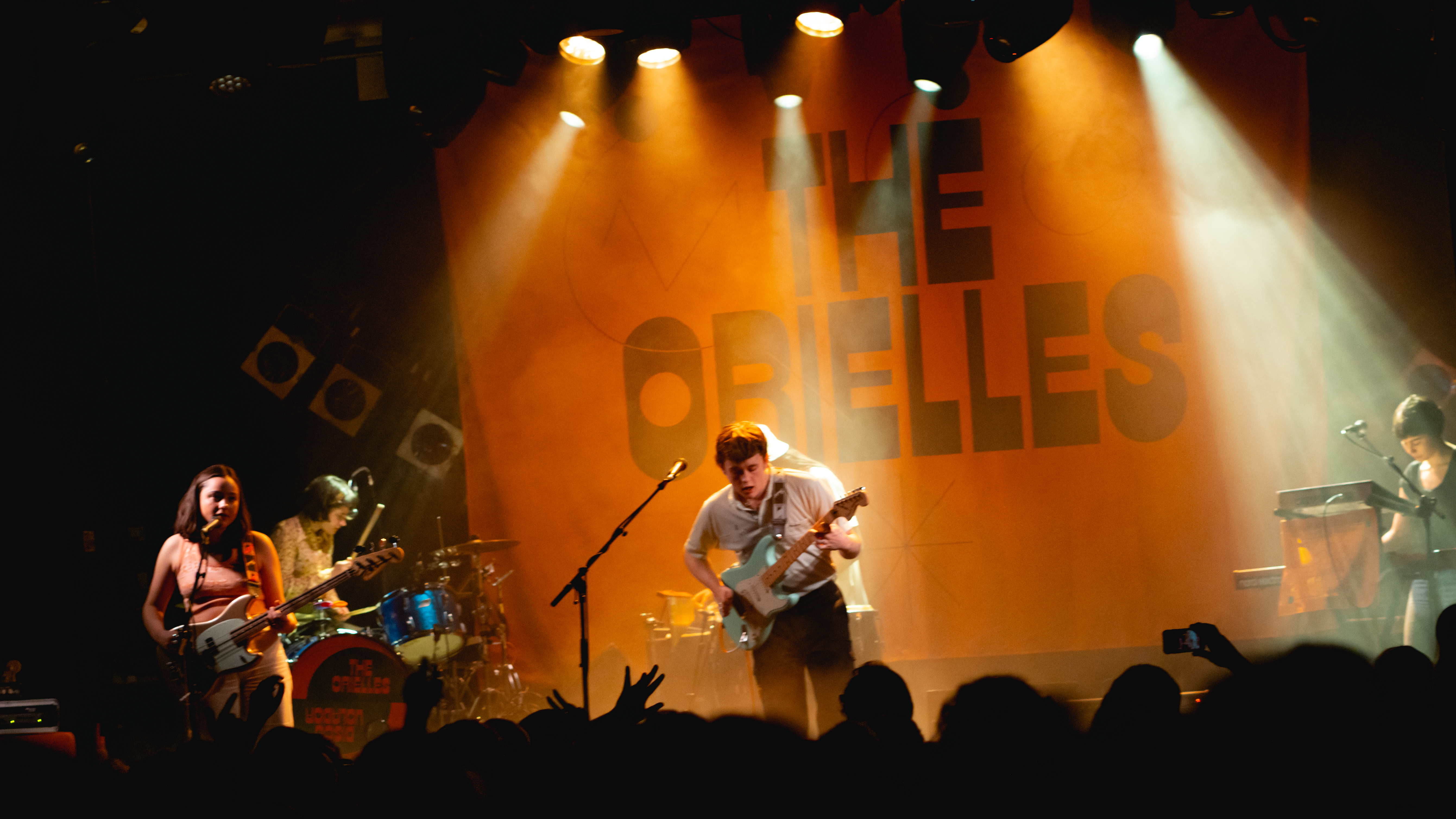 OriellesCamden040320-38